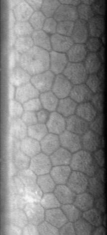 Corneal endothelium under specular microscopy Summary Image de l'endothélium cornéen prise in vivo par microscopie spéculaire. Image fournie par l'hôpital Bellevue de Saint-Etienne (France) et le Professeur Philippe Gain. first up-loadeur Ygavet